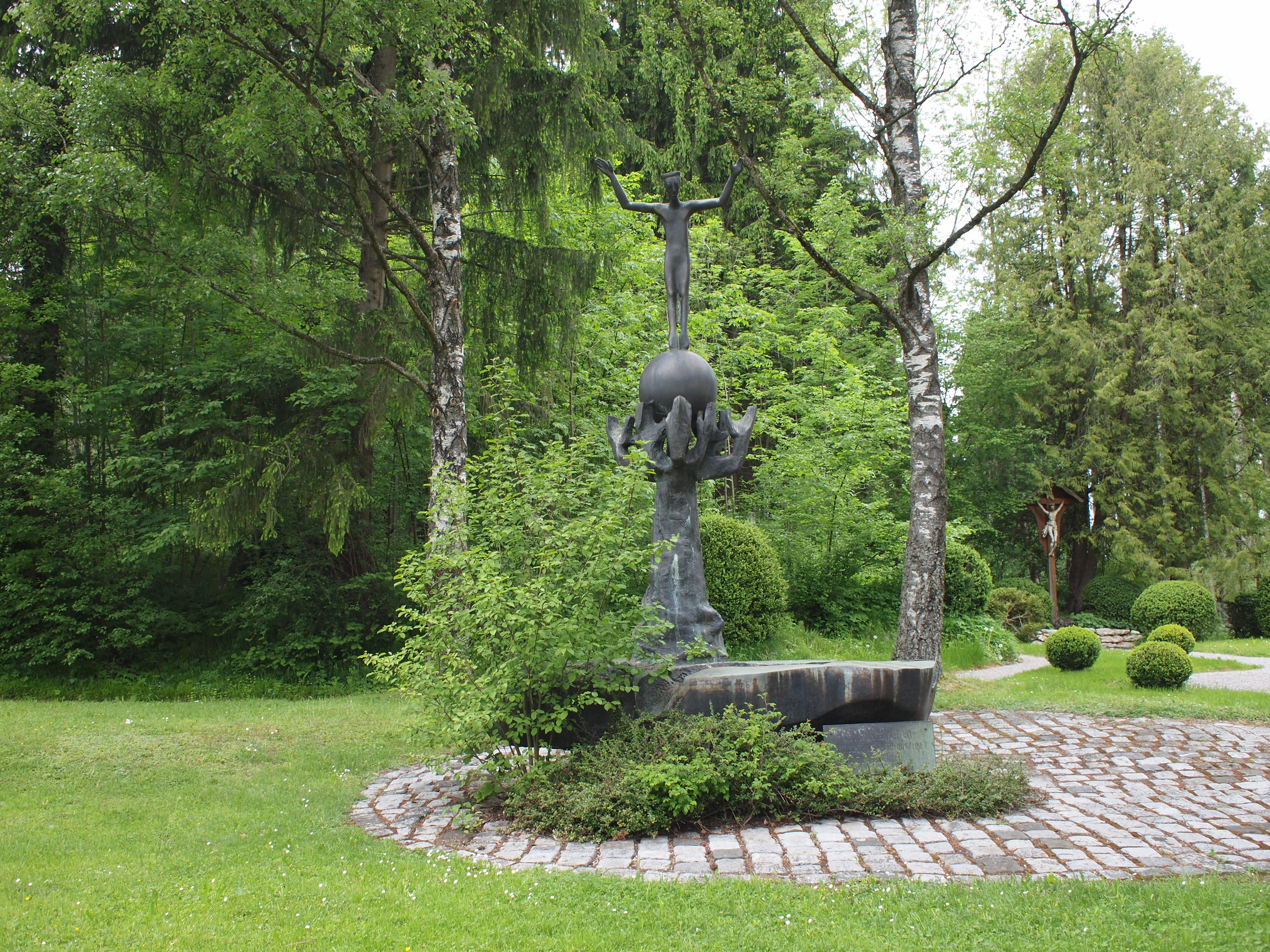 Irsee, Euthanasie-Denkmal im sog. Euthanasie-Friedhof in Kloster-Nähe, ein Werk des Bildhauers Martin Wank